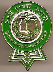 סיכת מש"צ (מתוך מש"צים פלוס)